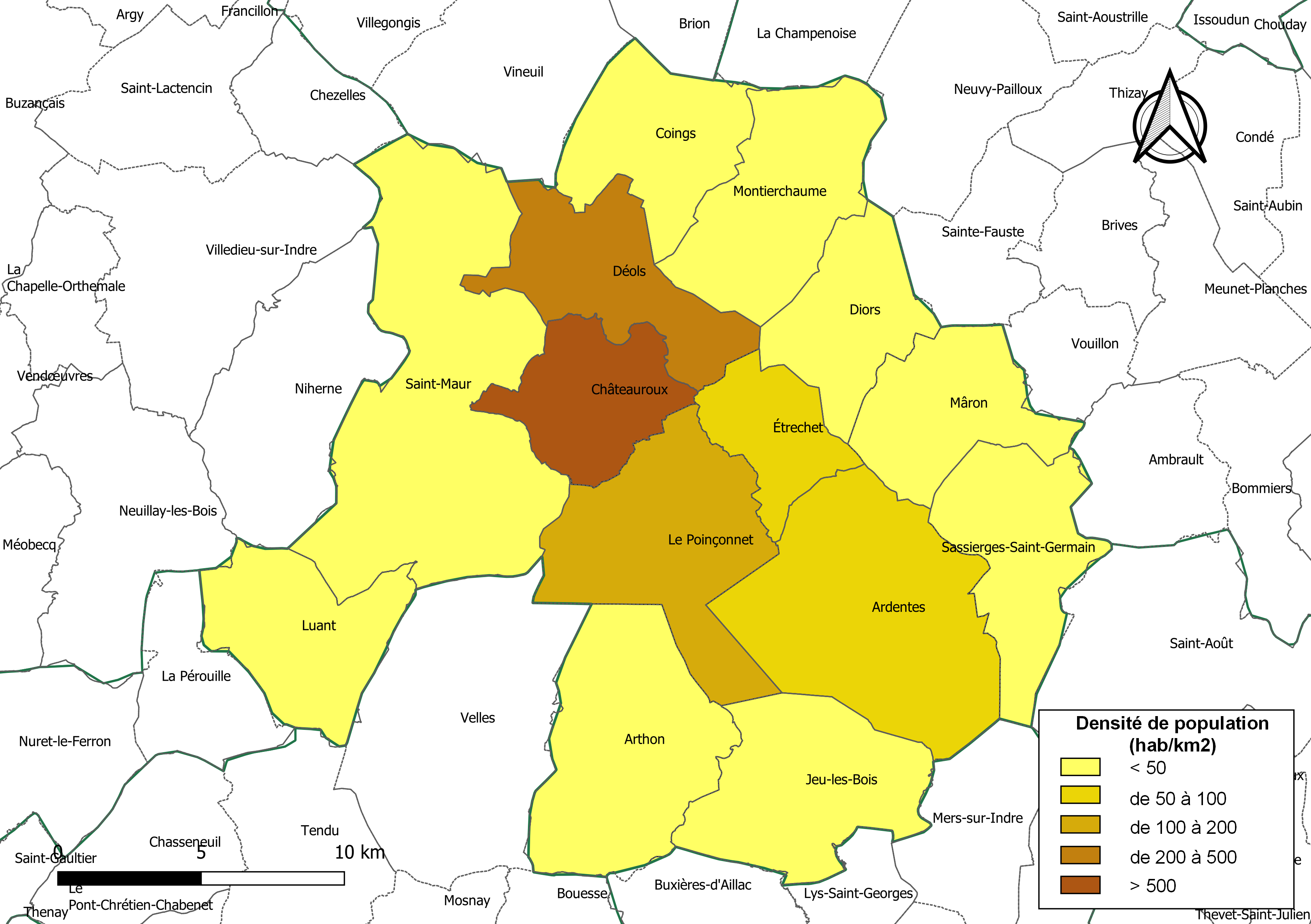 Carte des densités de population (millésimée 2016) des communes de la communauté de communes l'intercommunalité Châteauroux Métropole, département de l'Indre, France. Composition au 1er janvier 2019.